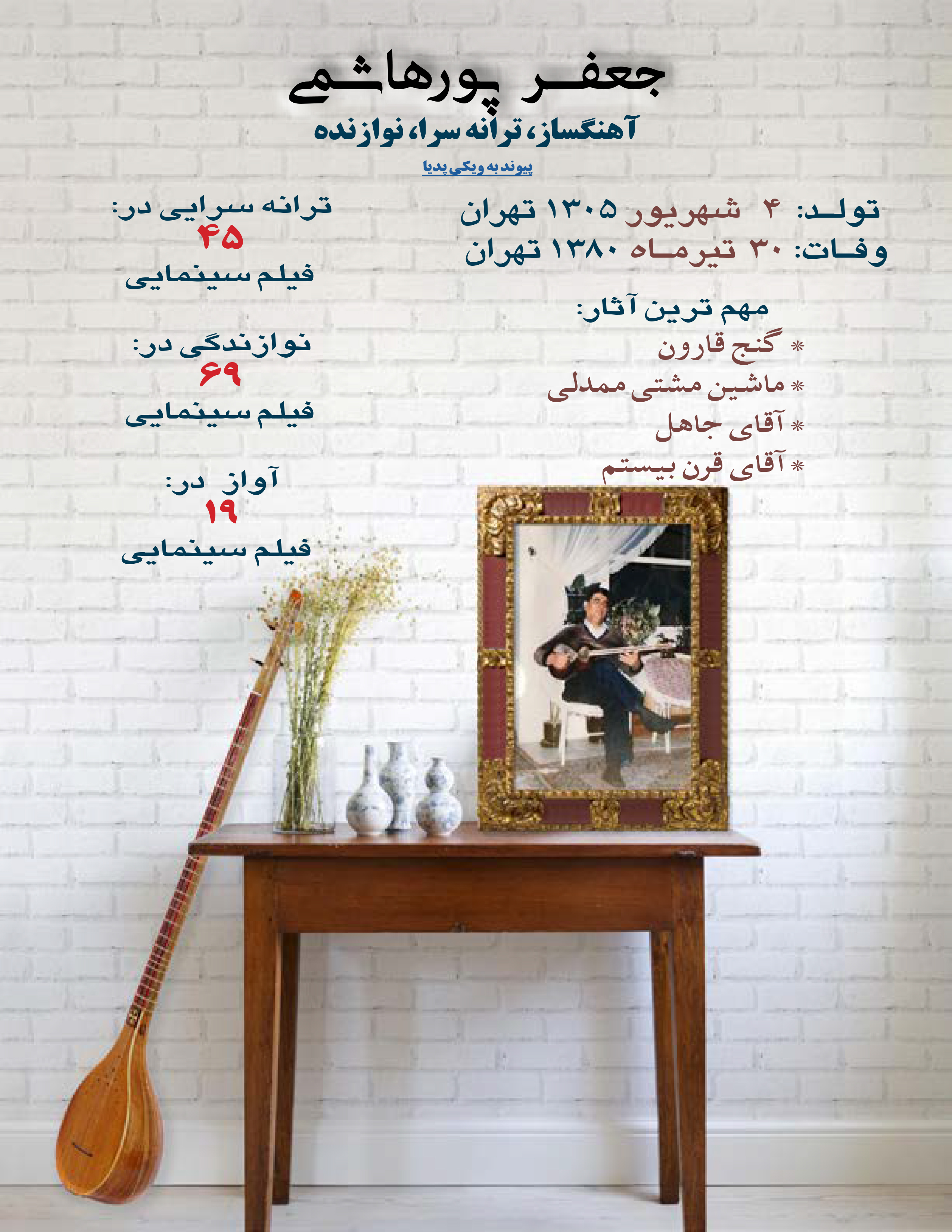 اینفوگرافی ساده در خصوص زندگی مرحوم پورهاشمی